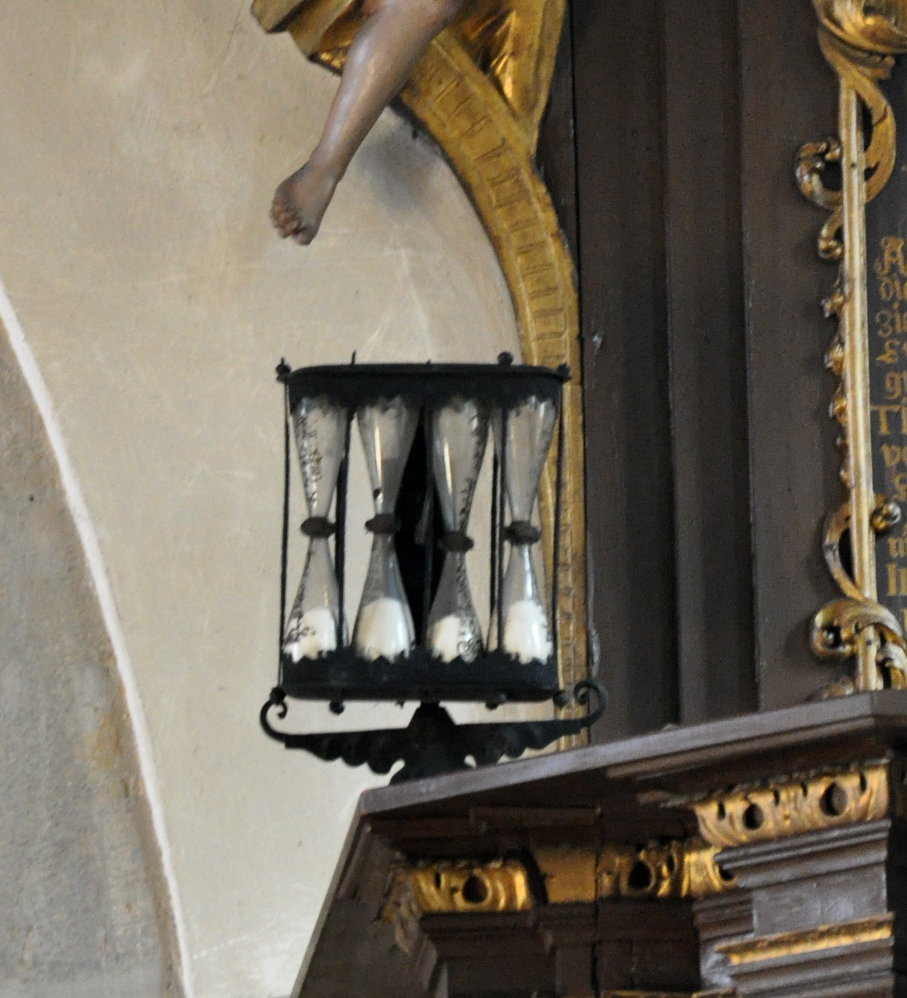 Marktbreit, Evangelisch-lutherische Stadtpfarrkirche St. Nikolai, Kanzel von 1737, Kanzeluhr